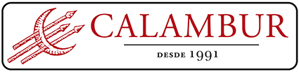 Calambur Editorial, desde 1991